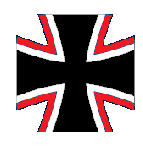 escudo de norosi